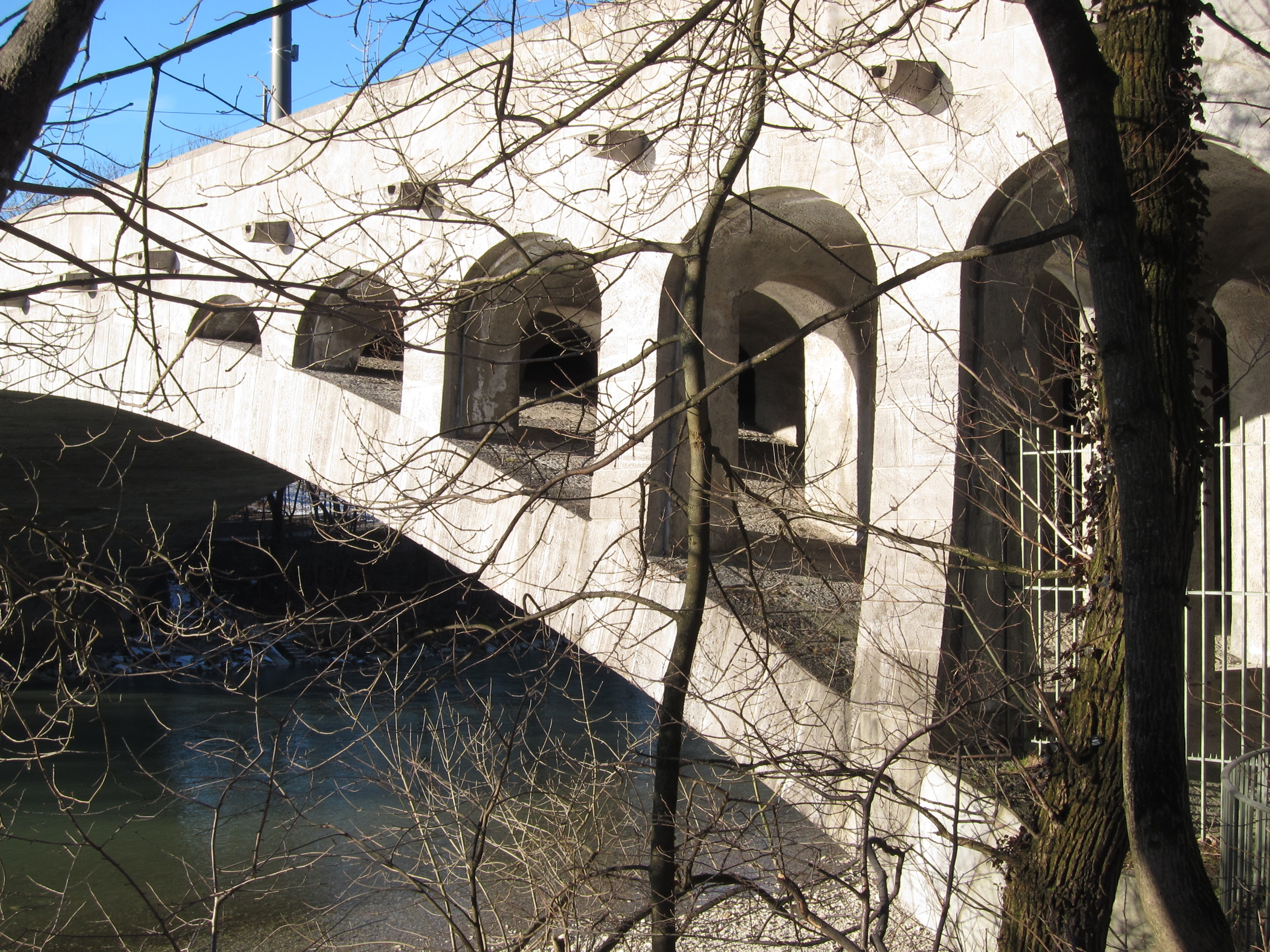 Max-Joseph-Brücke, München, Blick in die Aufständerung